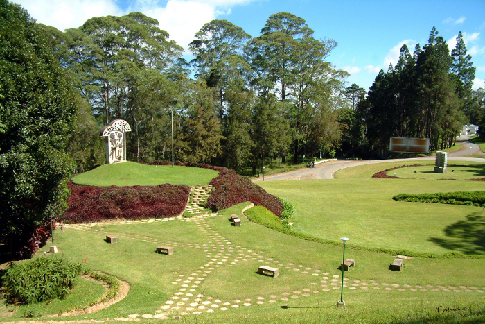 Plaza Bolívar y Bello IVIC